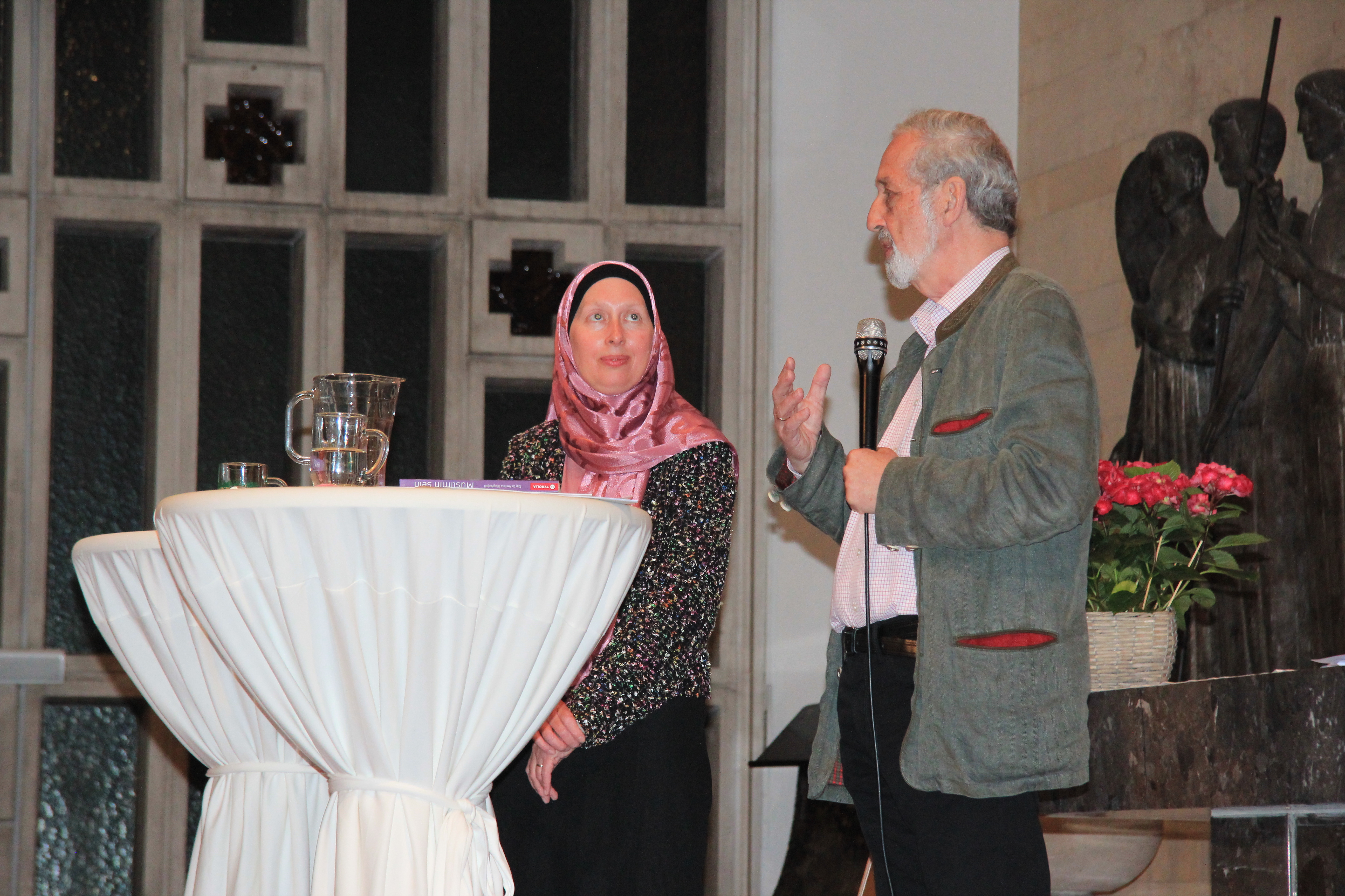 Carla Amina Baghajati und Heinz Nußbaumer in der Langen Nacht der Kirchen 2015 in der Hinterbrühl, Niederösterreich